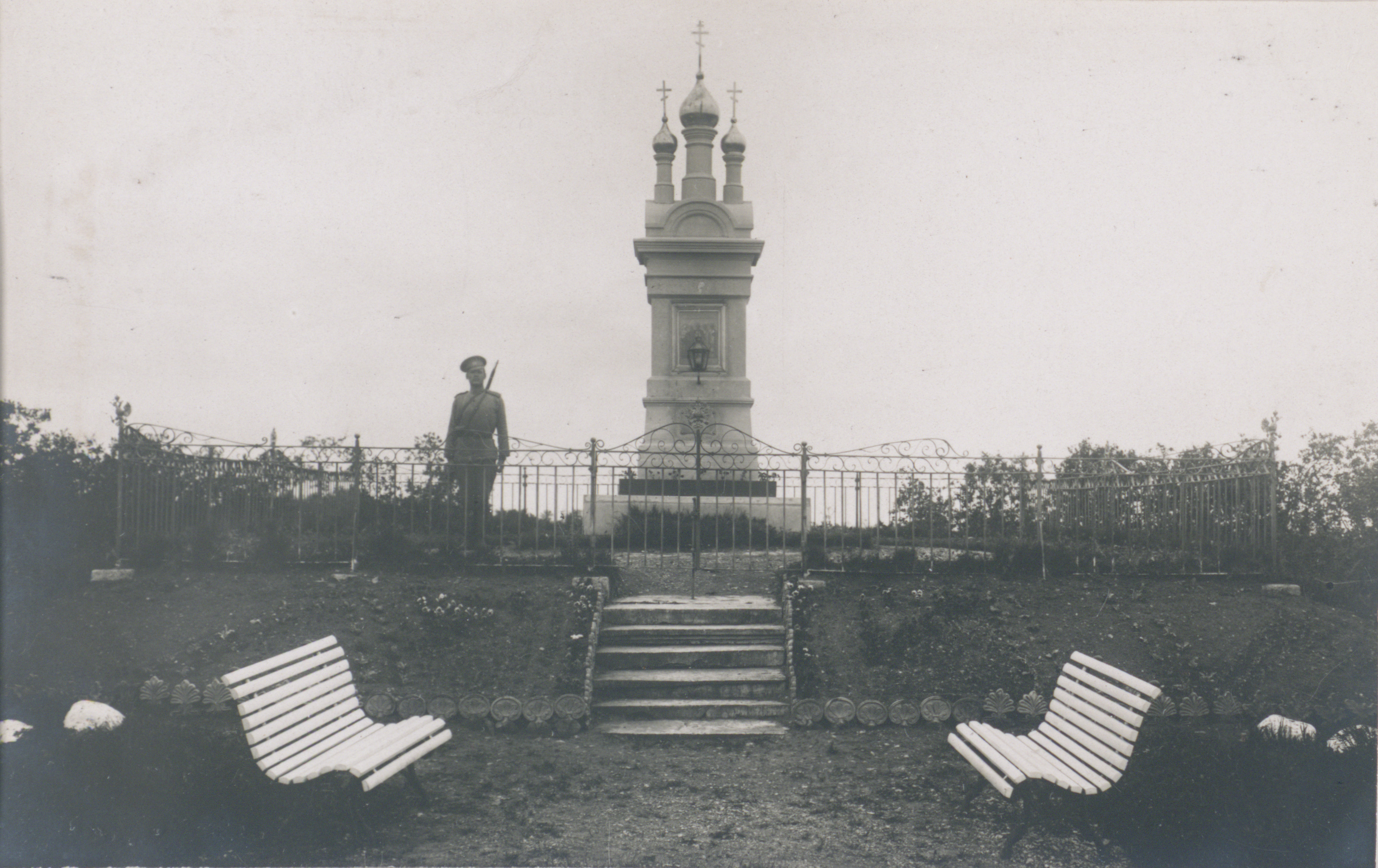 Haapsalu, Pullapää mälestussammas